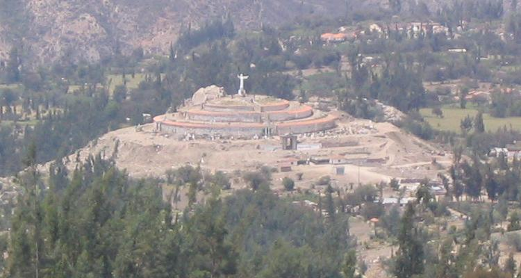 Yungay Viejo in Peru, Ancash